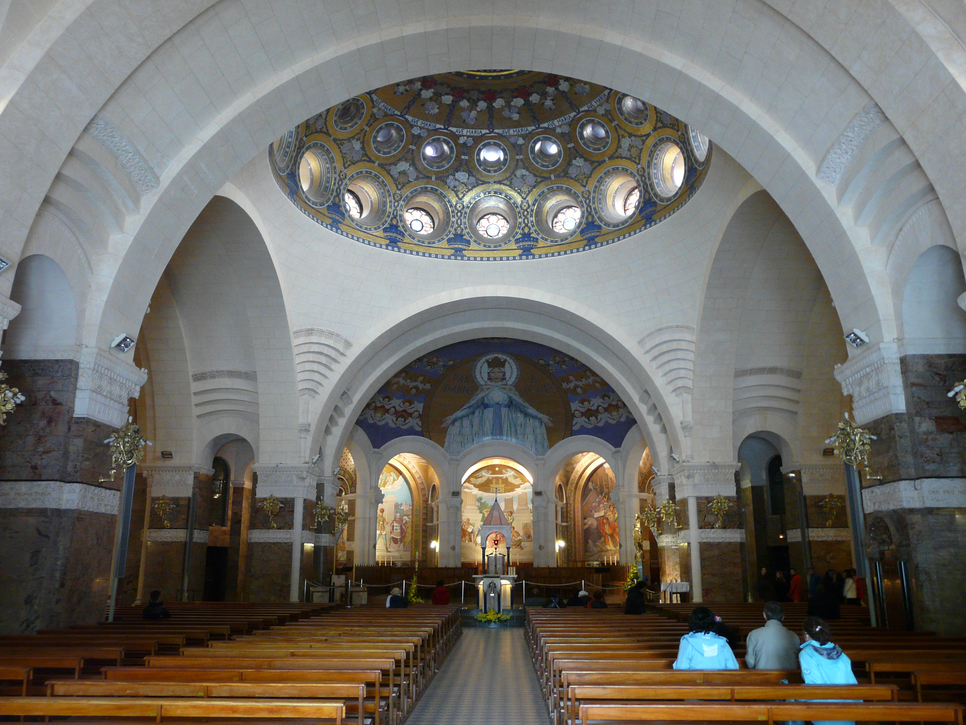 La nef de la basilique Notre-Dame du Rosaire, Lourdes, Hautes-Pyrénées, France.